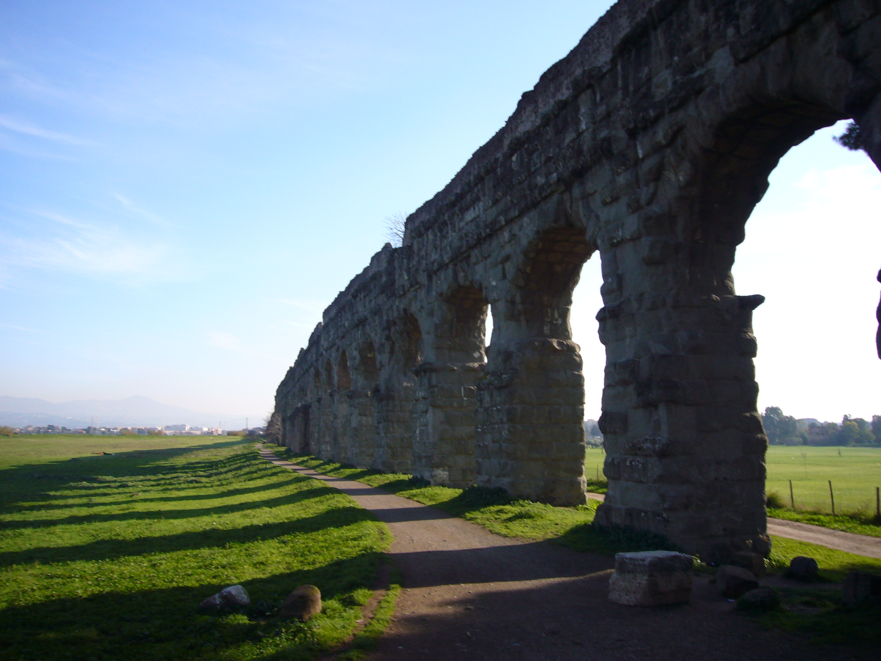 Roma, viale Appio Claudio, Parco degli Acquedotti